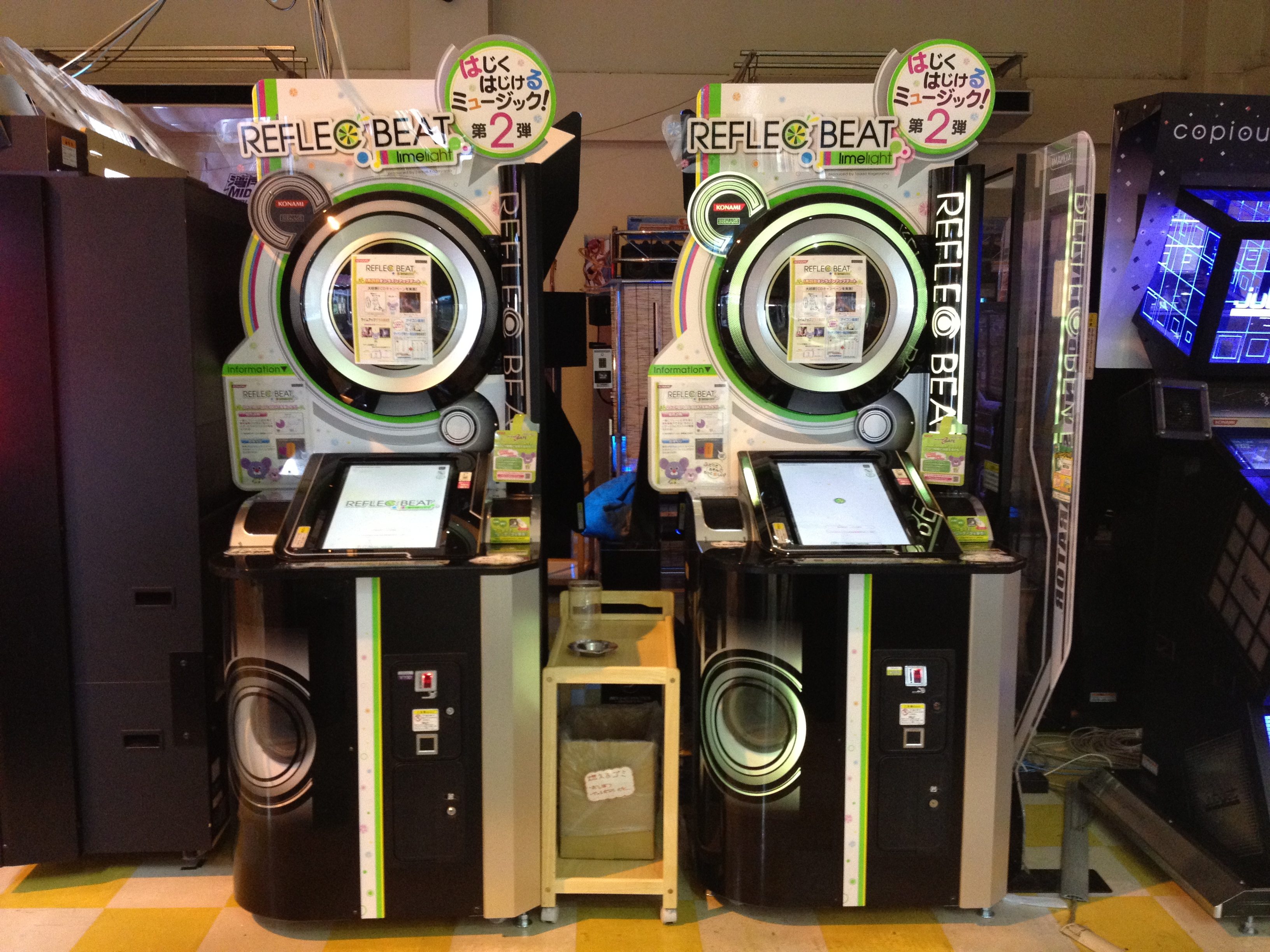 REFLEC BEAT limelight 本体。